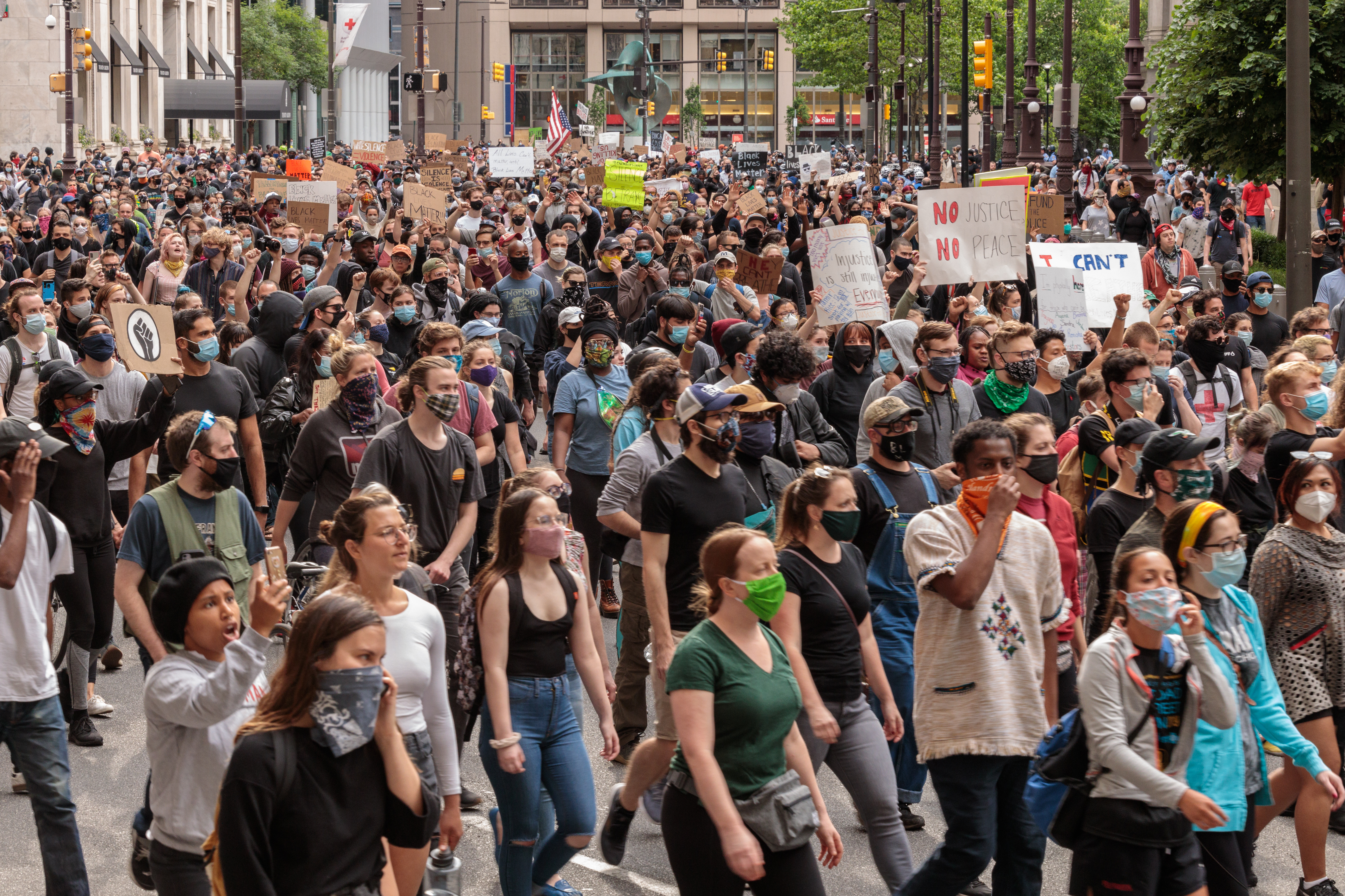 Civil Unrest 2020